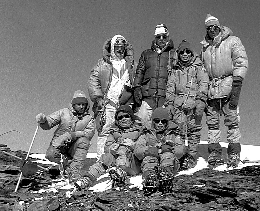 Communism Peak (Ismail Samani Peak) in 1985. From left: Alfred Lõhmus, Jaan Künnap, Kalev Muru, Junko Tabei and Ilmar Priimets + two Japanise alpinists sitting in front: Nobuko Yanagisawa (left) and Mayuri Yasuhara.